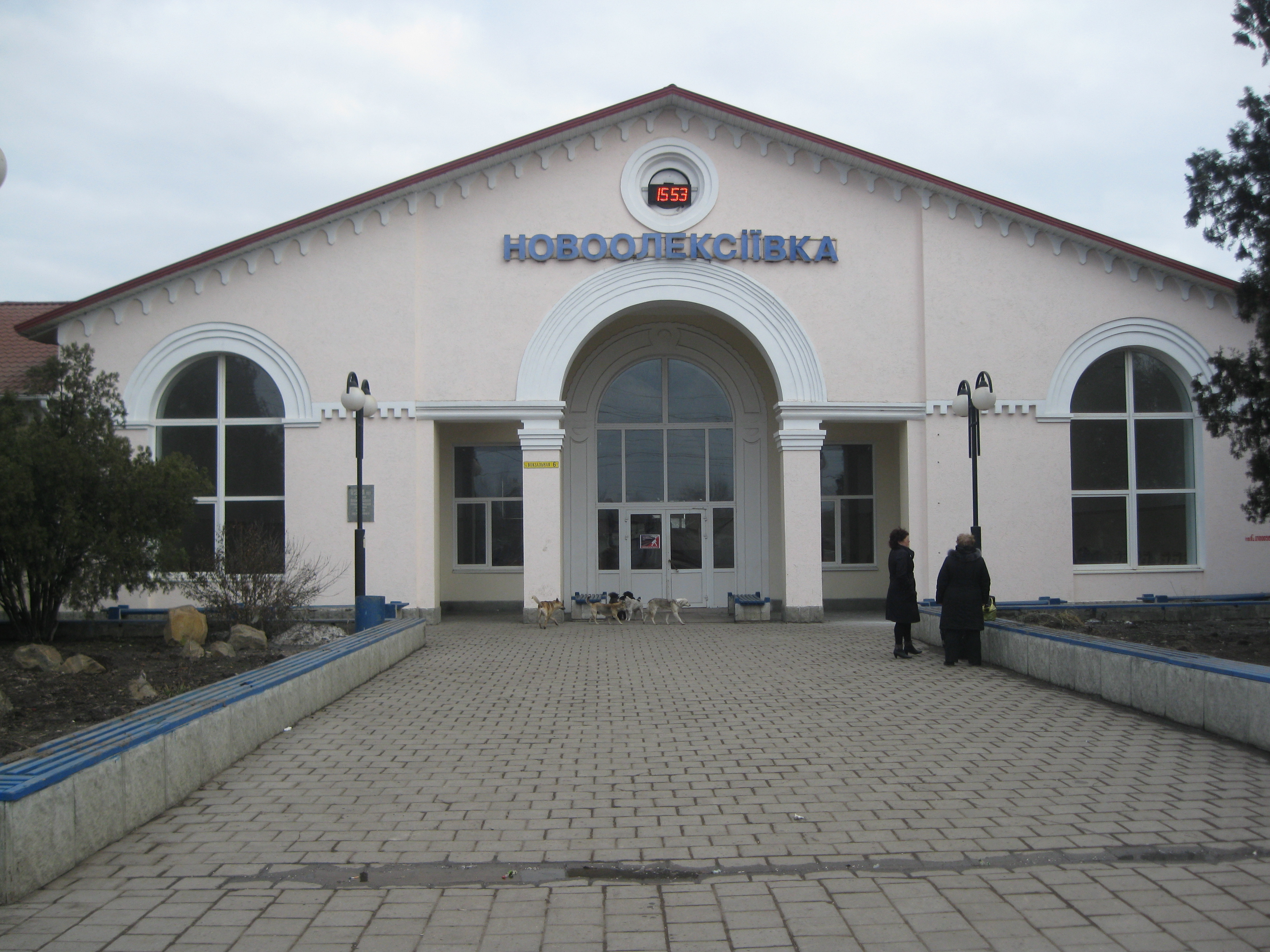 Здание вокзала станции новоалексеевка